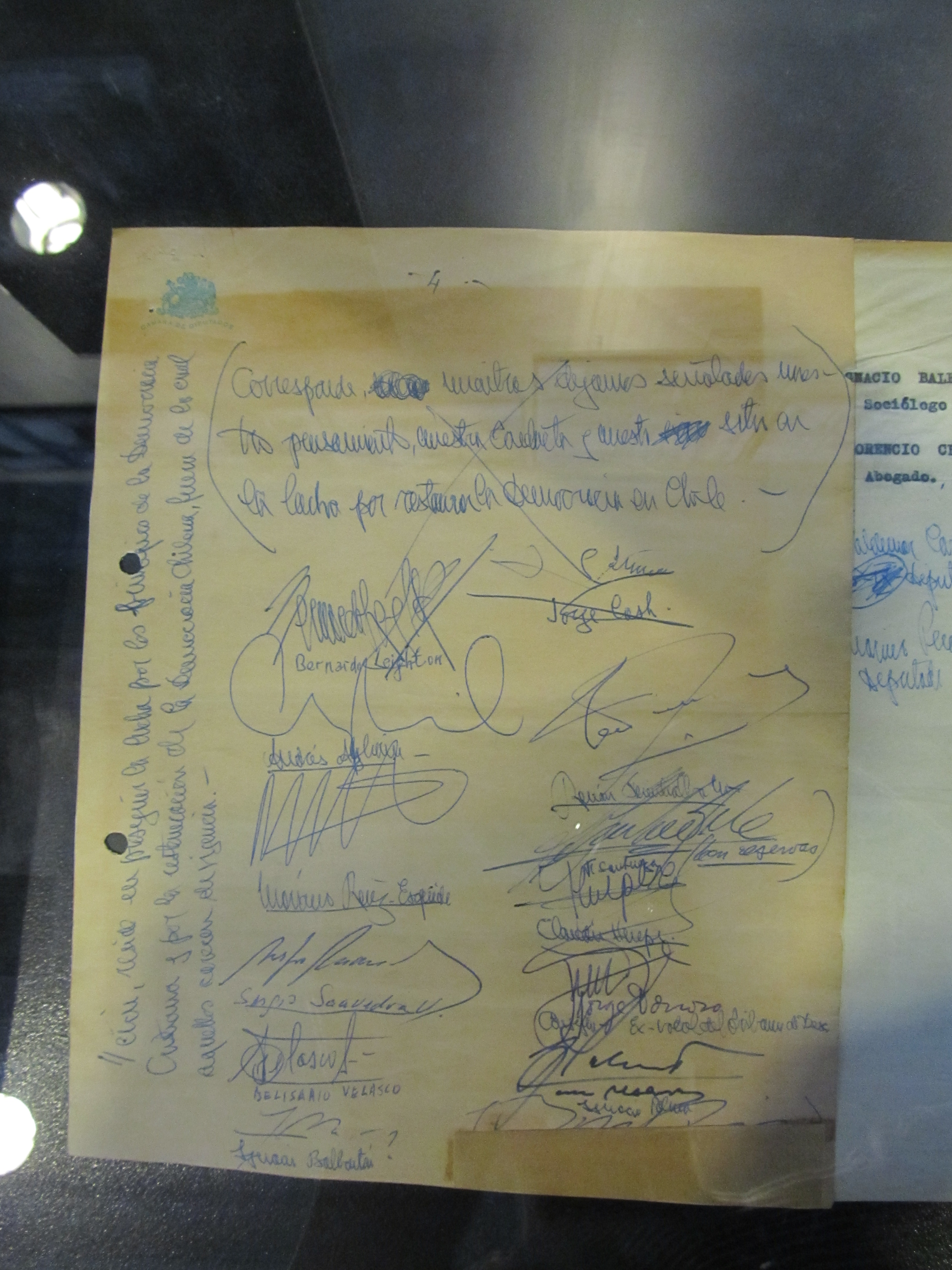 Declaración de los 13, ante el golpe de Estado en Chile de 1973. Exposición en el Museo de la Memoria y los Derechos Humanos, Santiago de Chile.